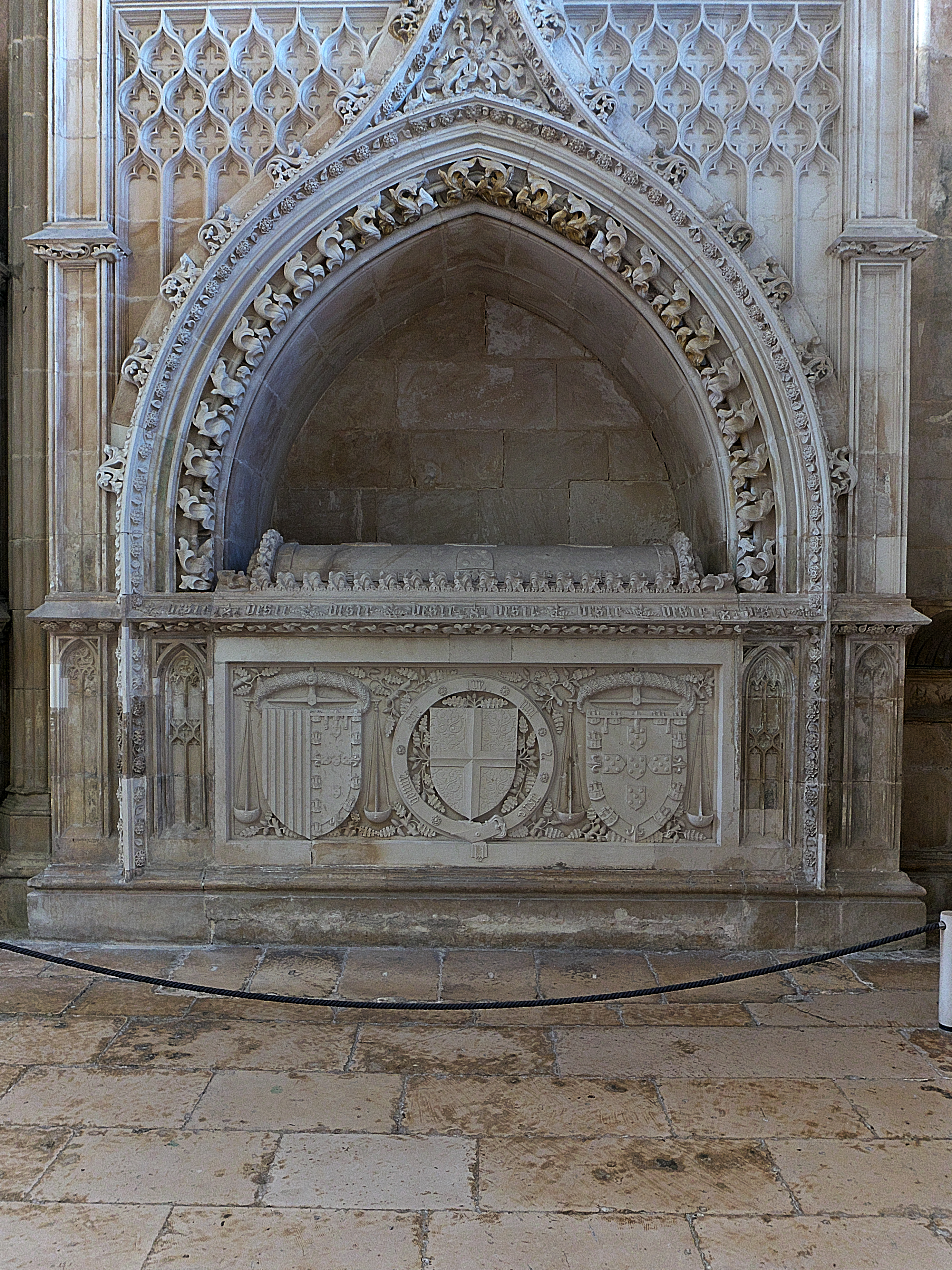 Capela do Fundador (Monasterio de Batalha). Sepulcro del infante, Pedro de Portugal, duque de Coímbra (†1449) y de Isabel de Urgel (†1459)